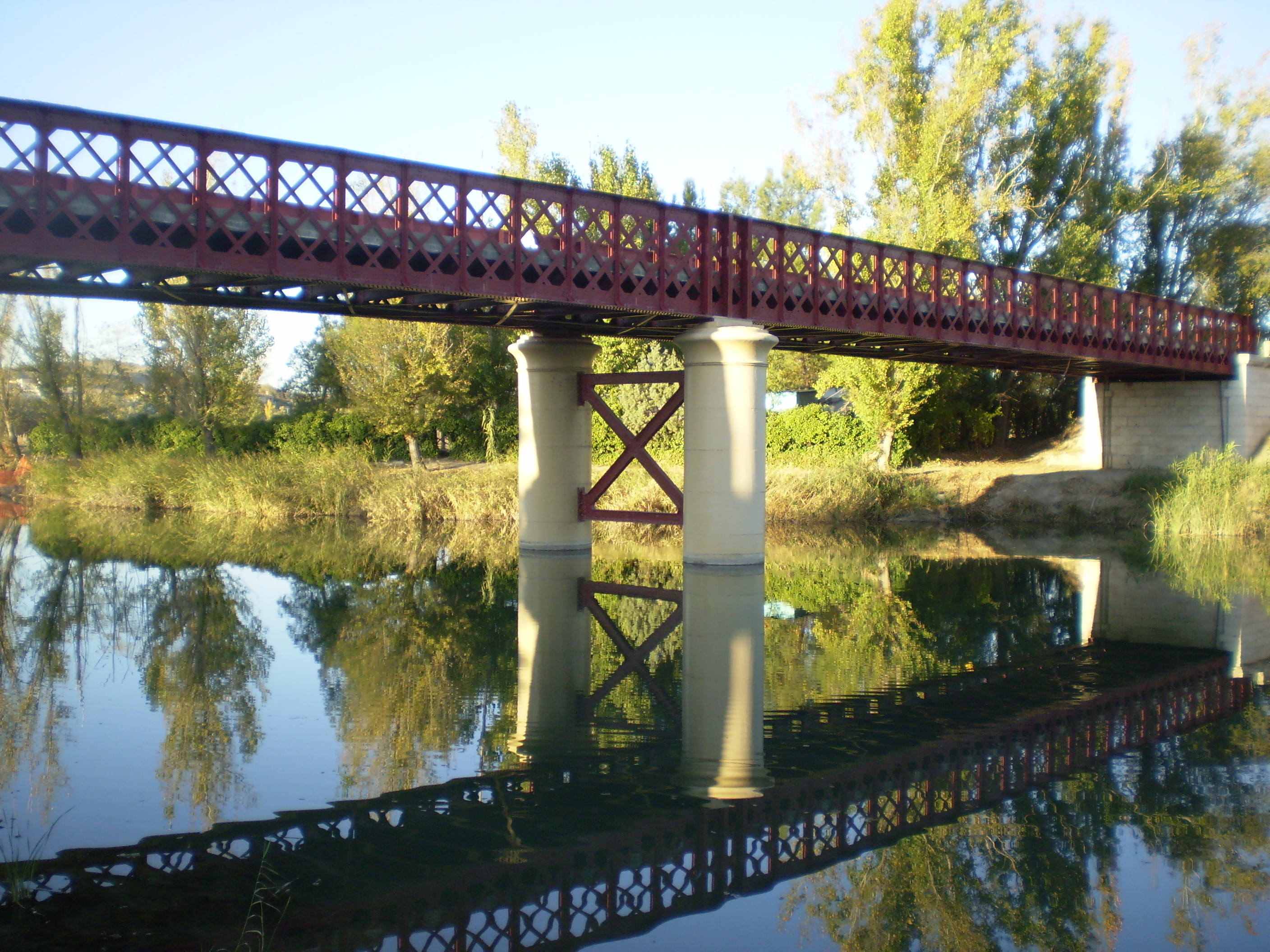 Fuentidueña Bridge over Tajo River. Fuentidueña de Tajo, Community of Madrid, Spain